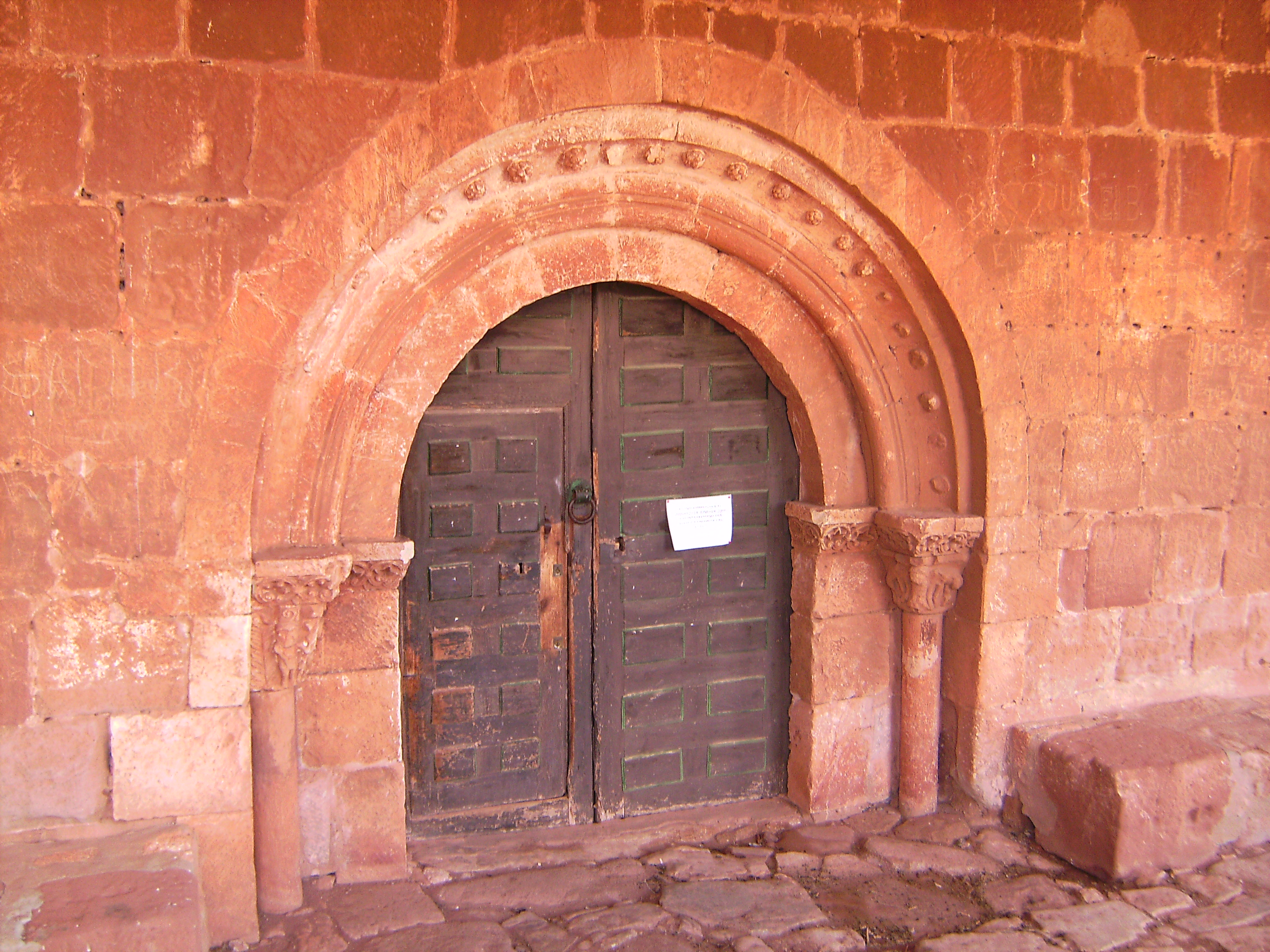 Tiermes - Iglesia de Santa Maria (Portada)